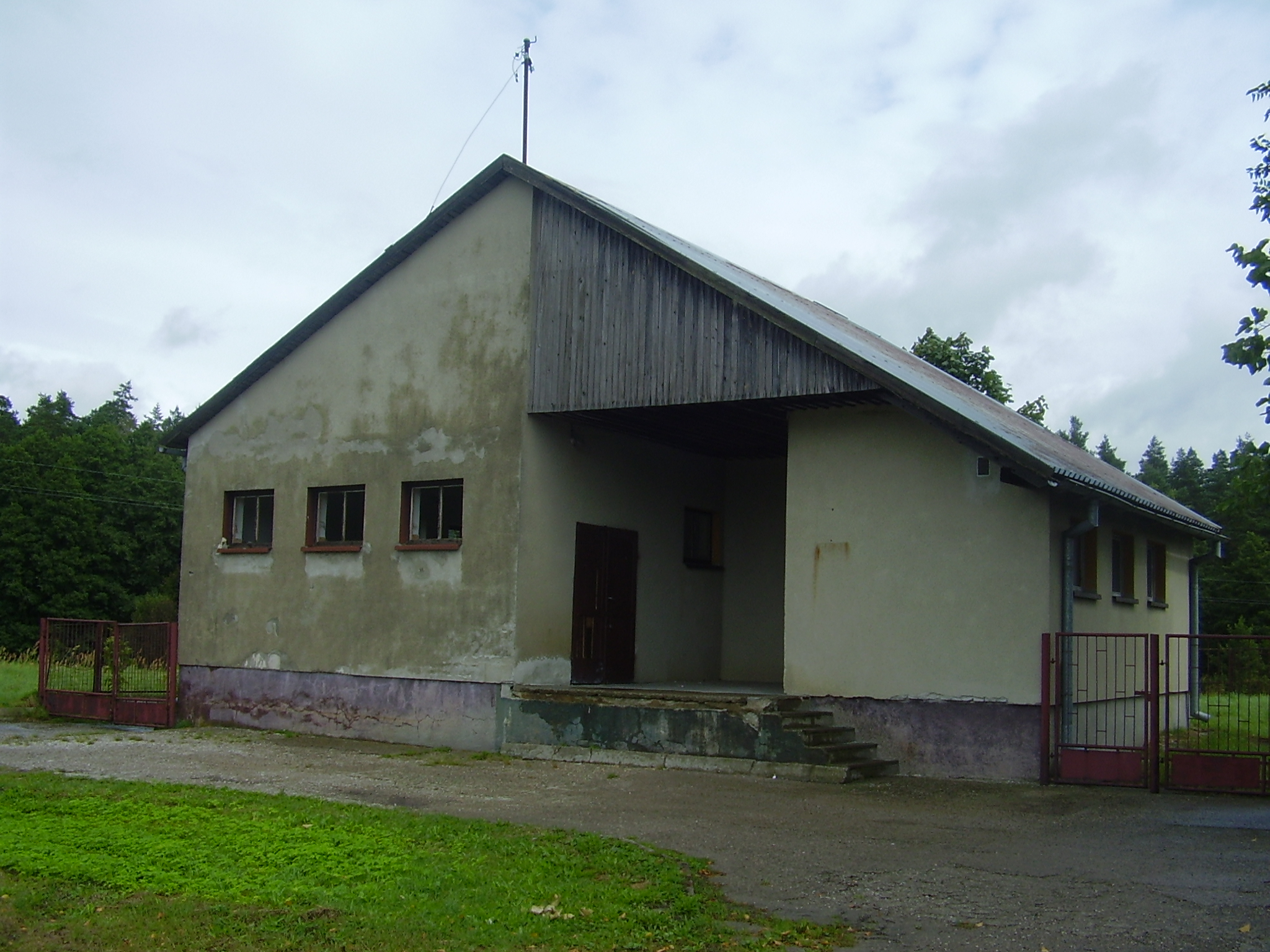 Budynek po mleczarni Rosocha sierpień 2012